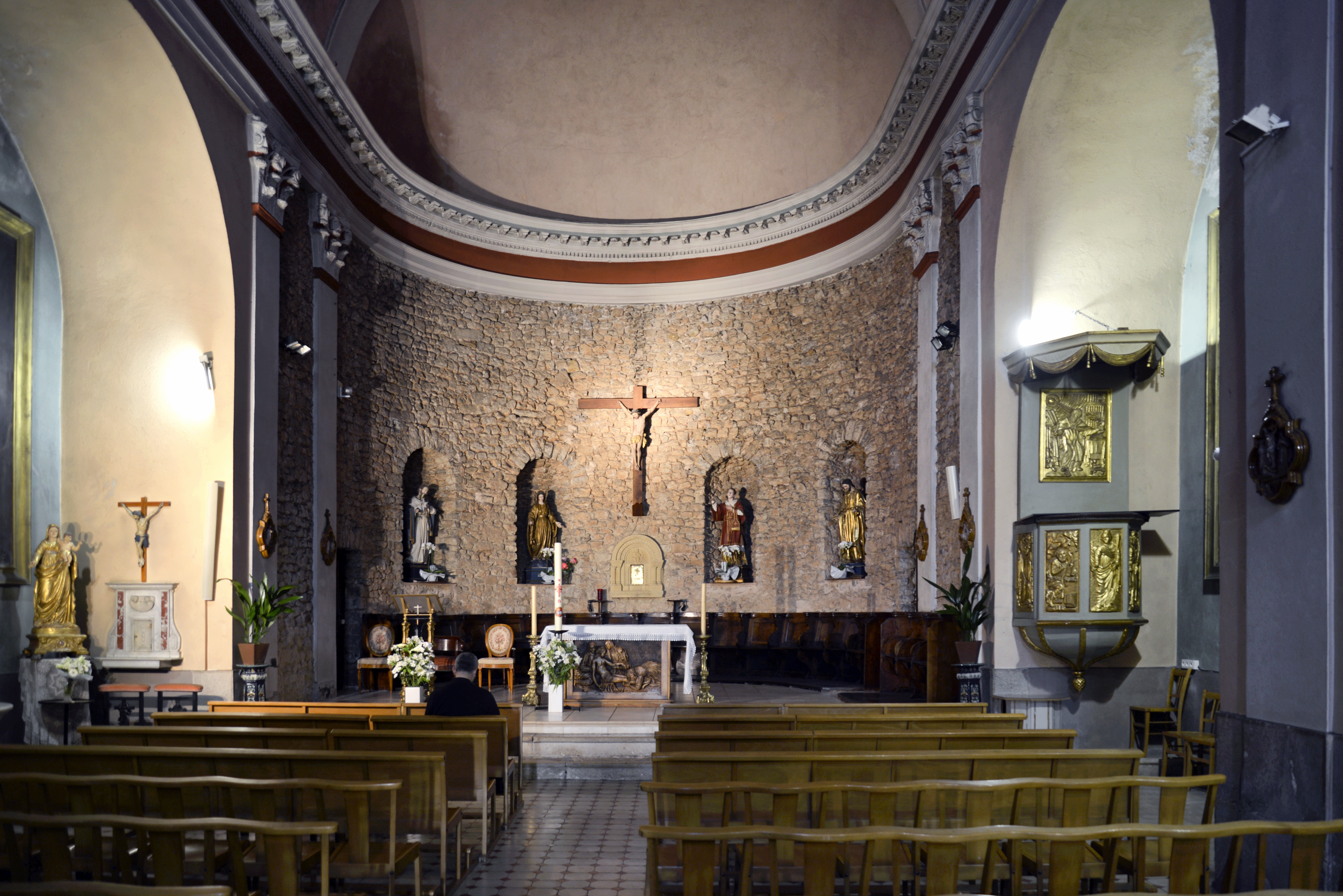 Garéoult, Provence (France) - Intérieur de l'église Saint-Étienne